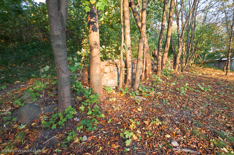 Мур. Малы замак. Навагрудак